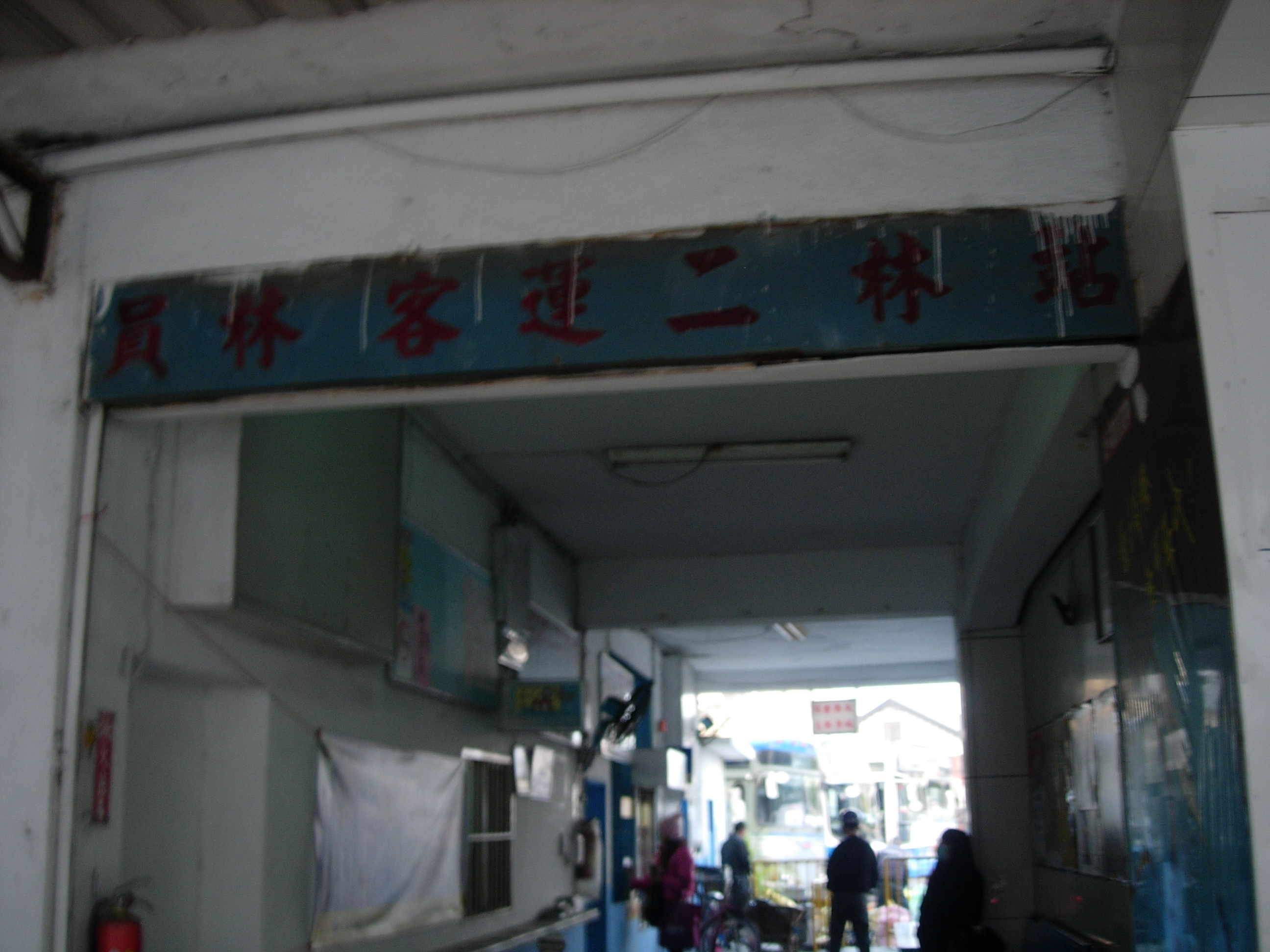 中文（台灣）: 員林客運二林站入口